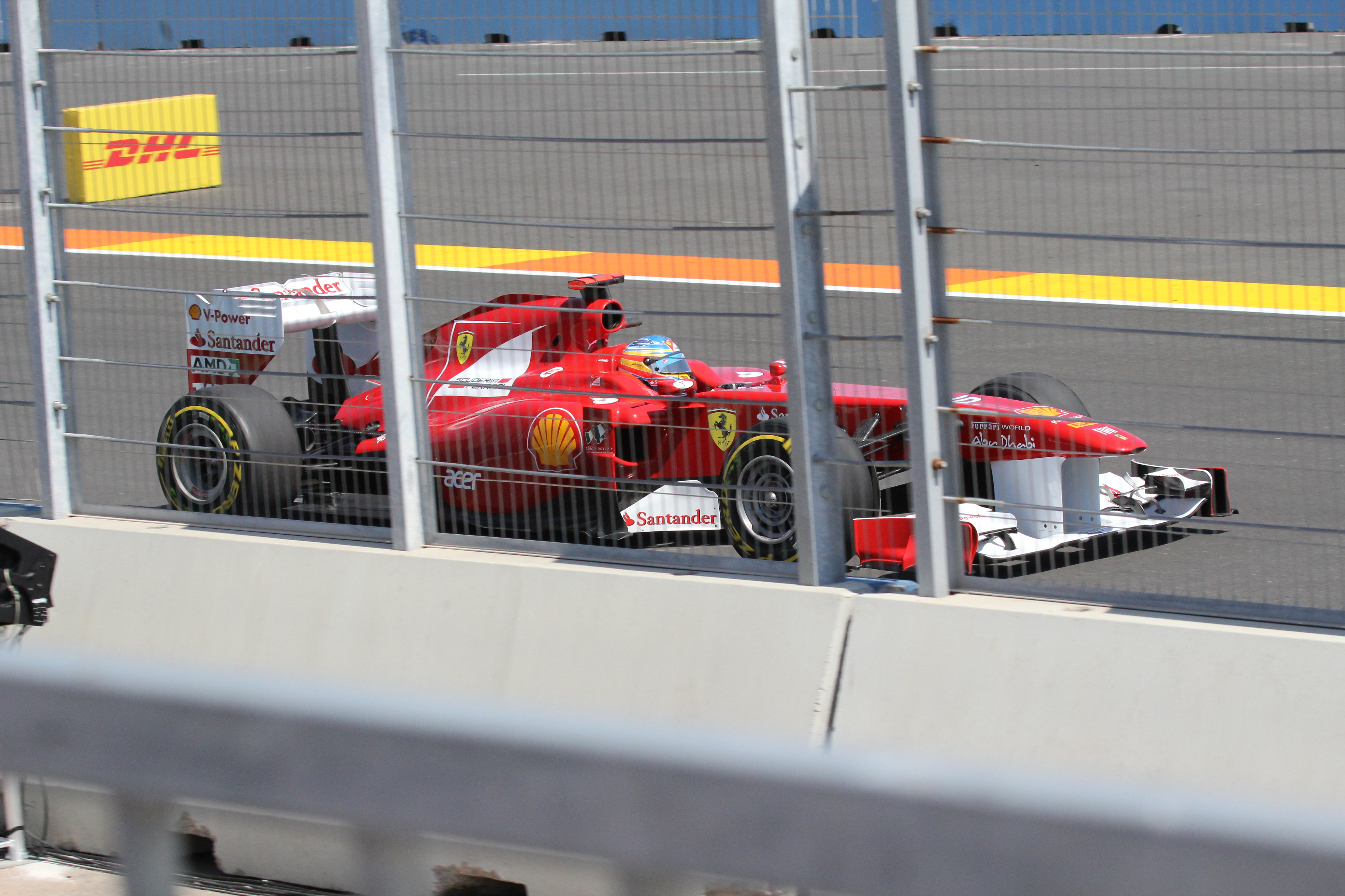 Fernando Alonso lors des EL3 du Grand Prix d'Europe 2011 sur Ferrari 150° Italia.